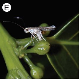 Epicephala perplexa